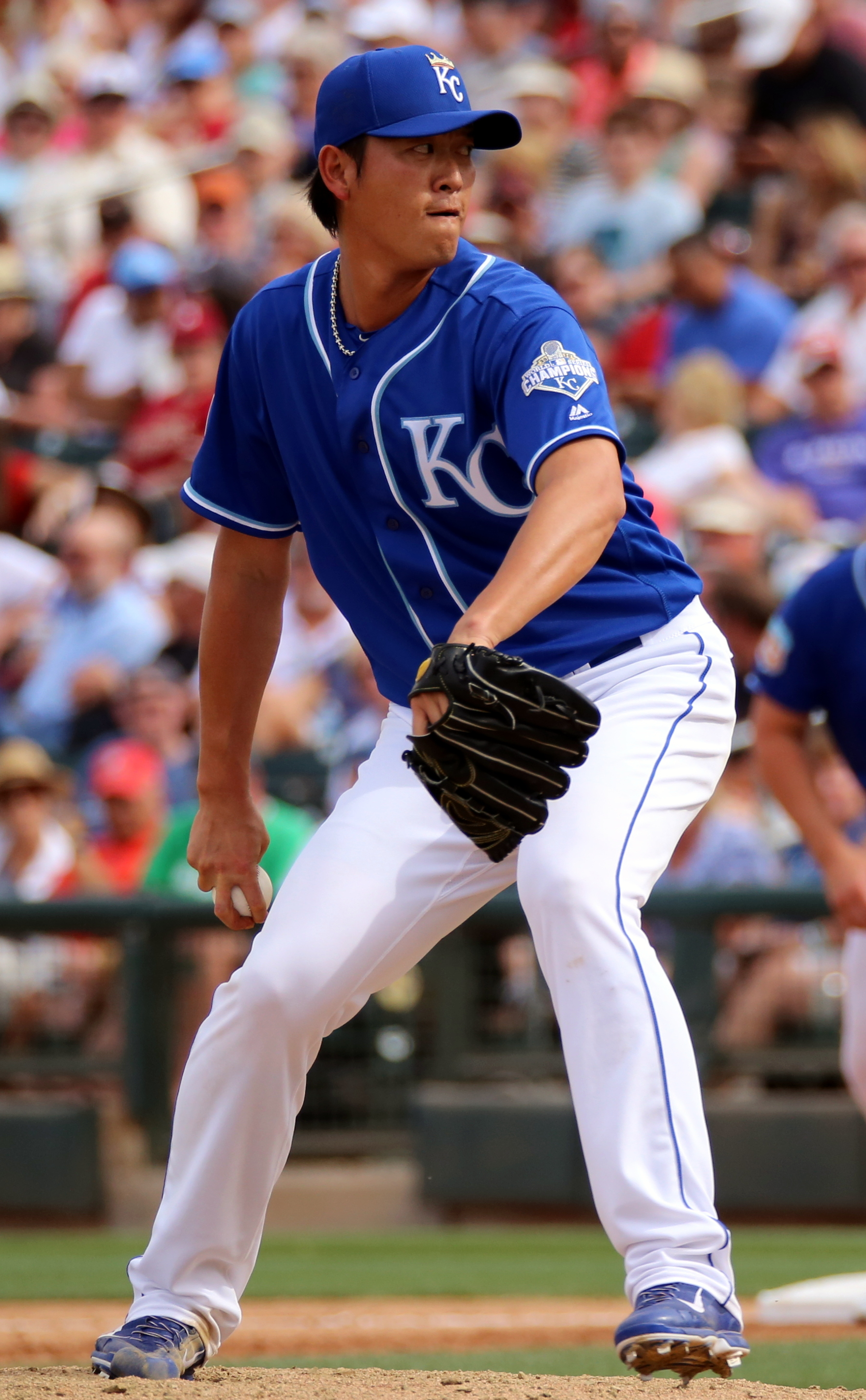 Chien-Ming Wang